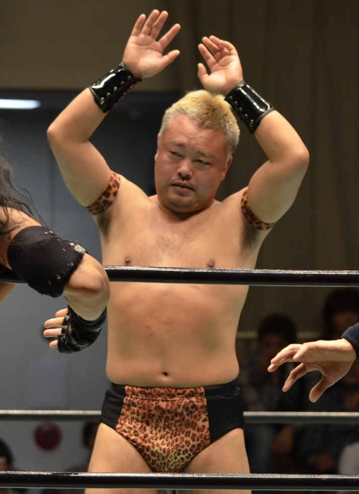 気仙沼二郎